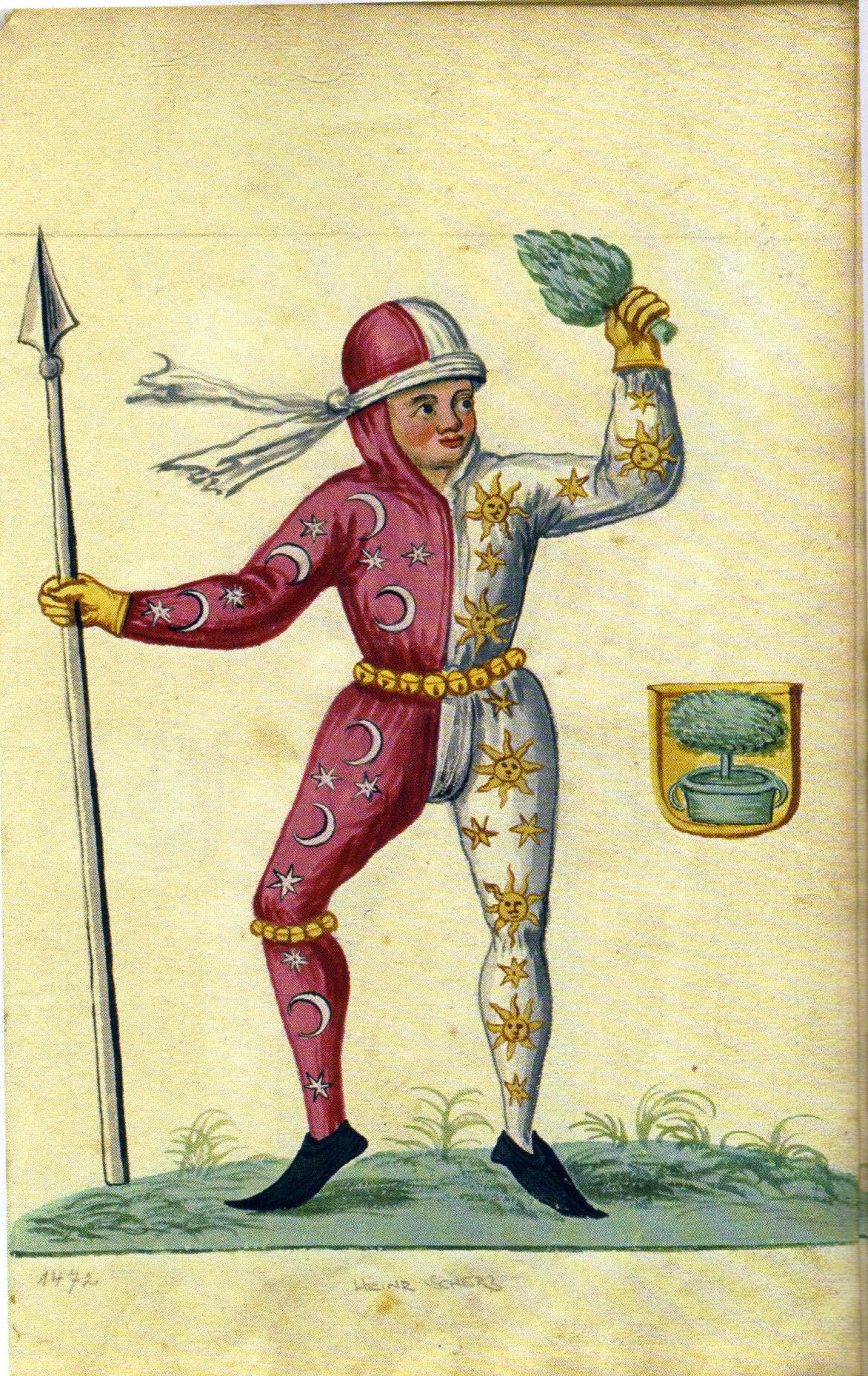 Kostüm der Schembartläufer des Jahres 1472 mit dem Wappen des Anführers Heinz Scherb, Nürnberg, GNM, Merkel Hs. 2° 861 Bl. 17r